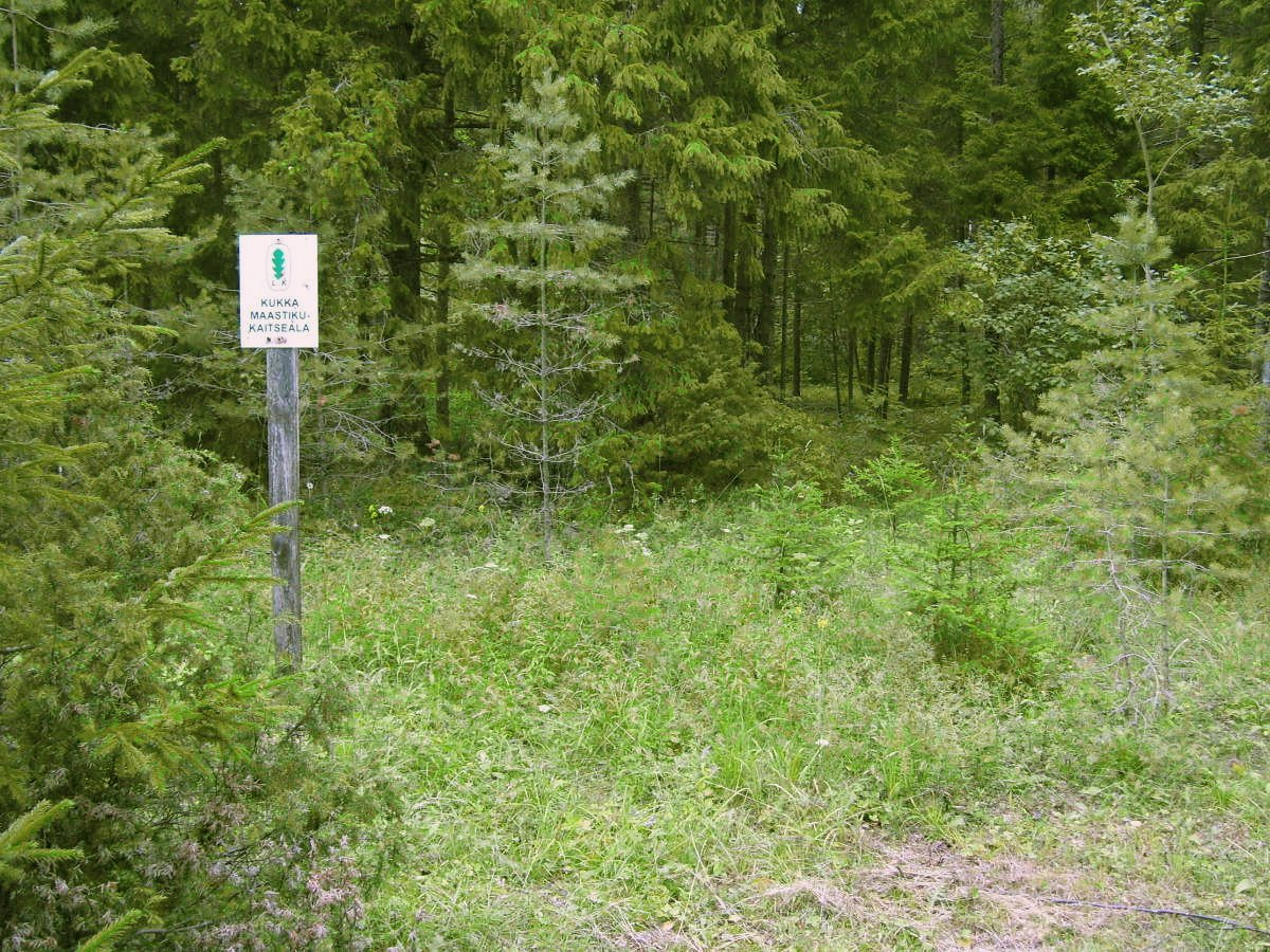 Kukka maastikukaitseala piir Partsi külas, Partsi-Palade metsatee ääres